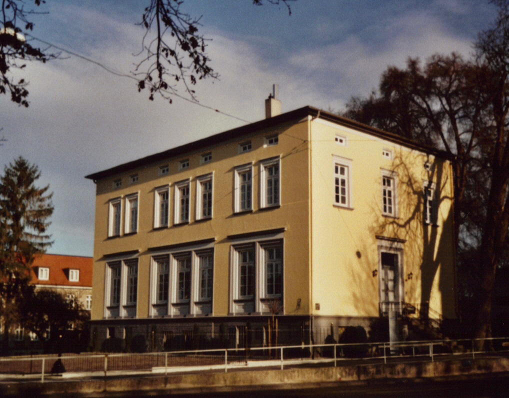 Lindemannsche Villa (1855-56) in Hildesheim, Oststadt.